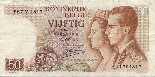 Biljet 50 Bef voor